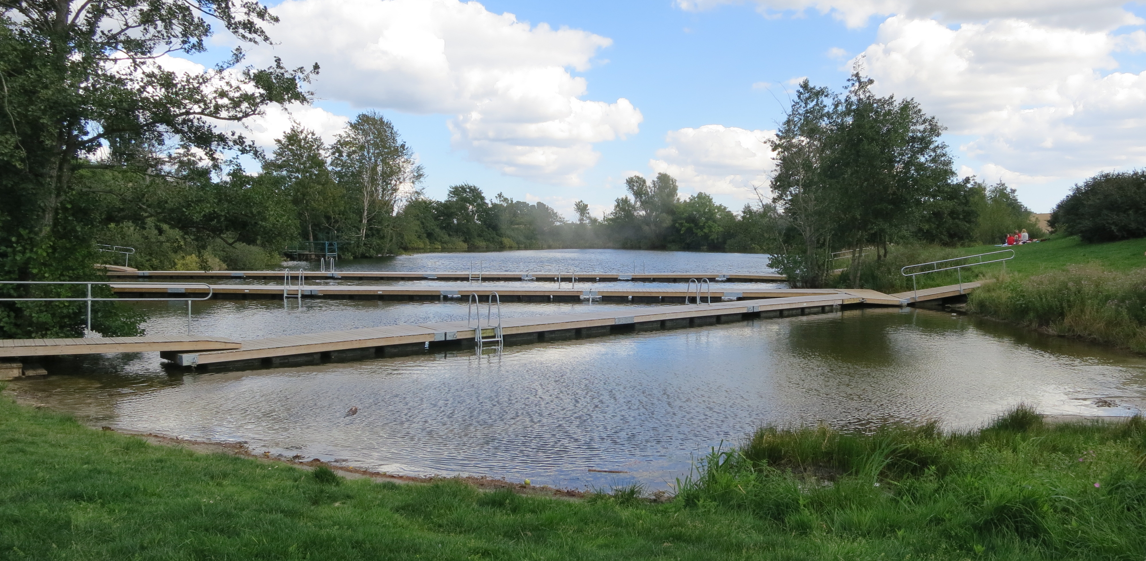 Pudesjö vid Hyby